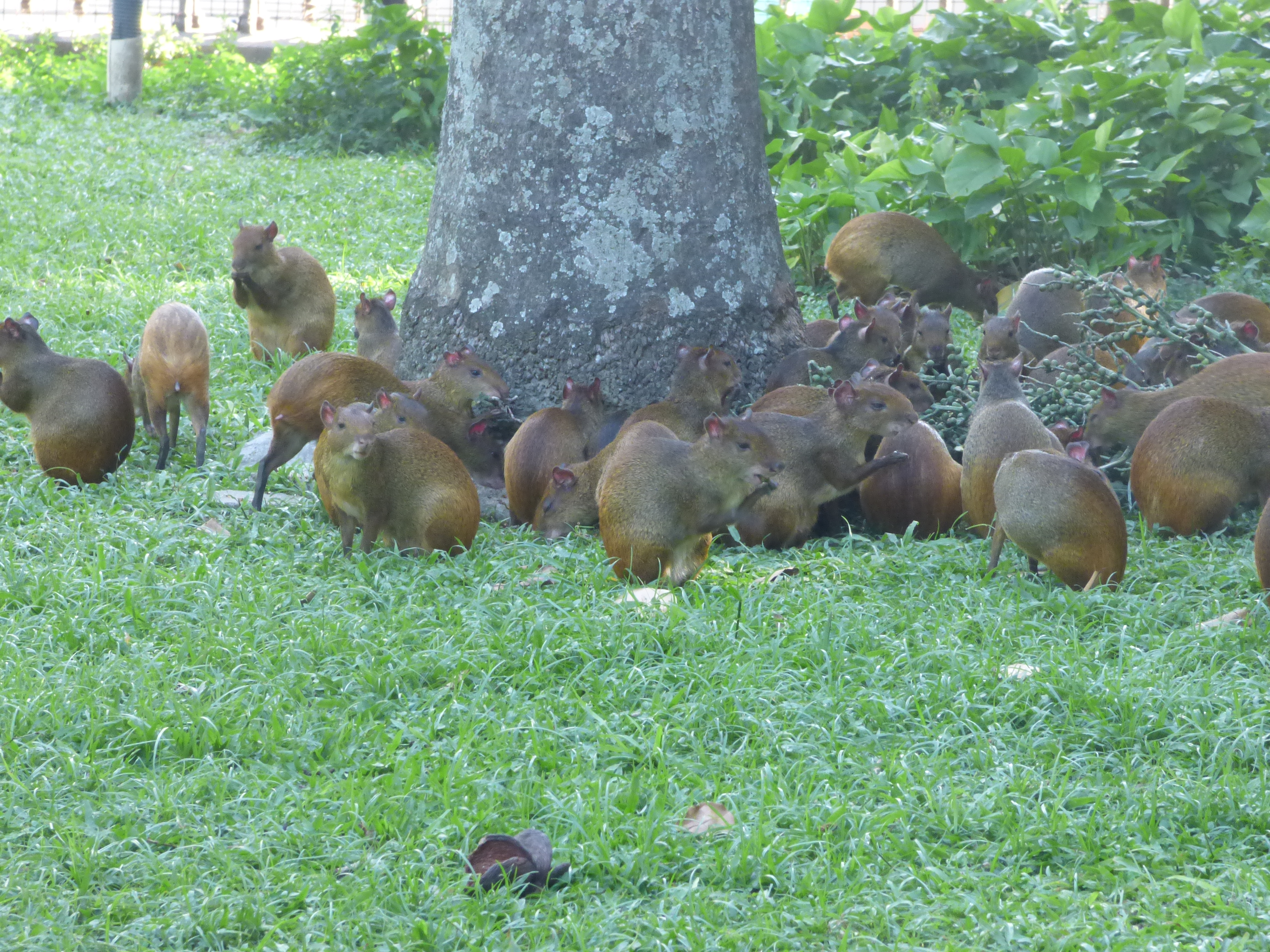 Interior del Parque Campo de Santana, Río de Janeiro